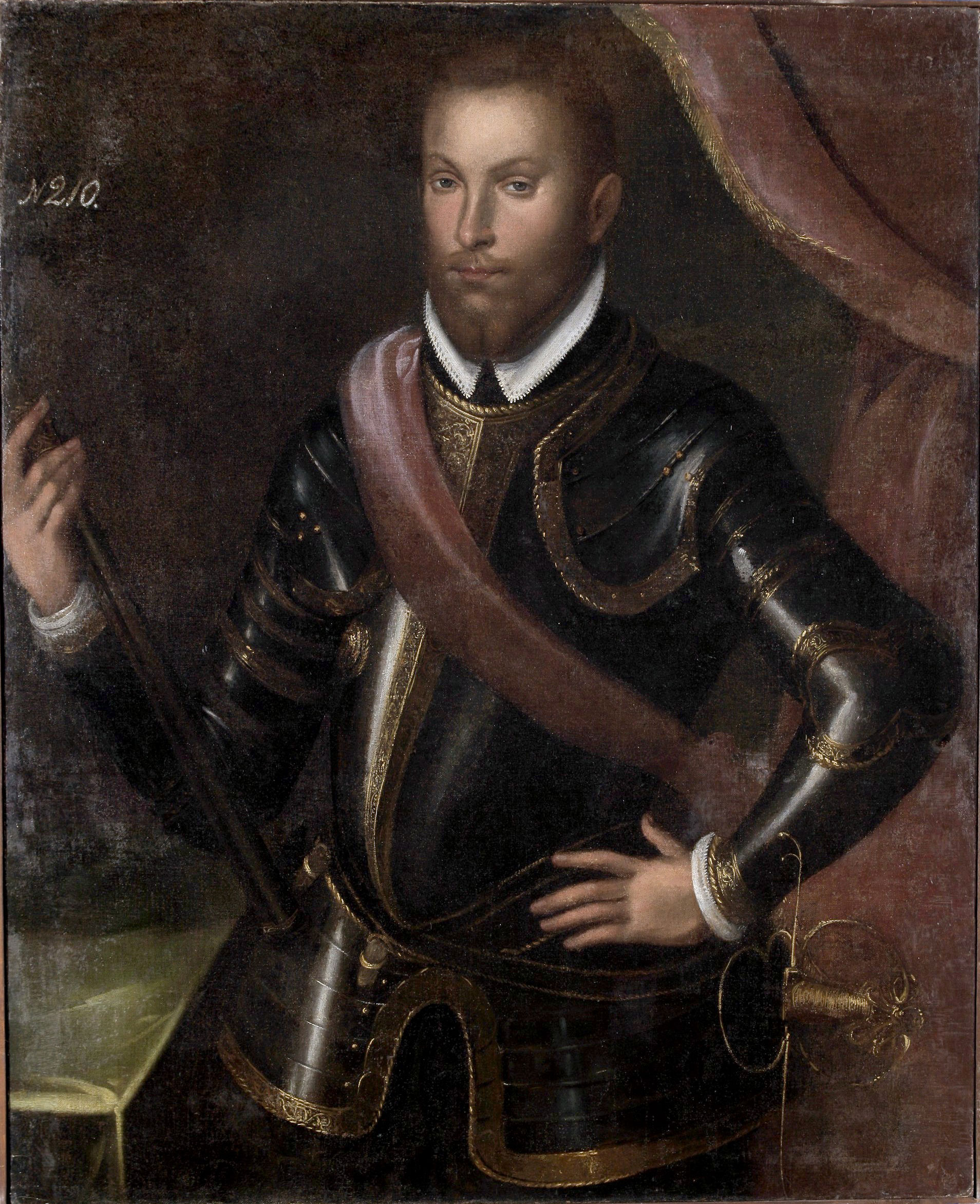 Беларуская (тарашкевіца): Партрэт Яна Радзівіла «Барадатага» (Jan Radzivił «Baradaty»)